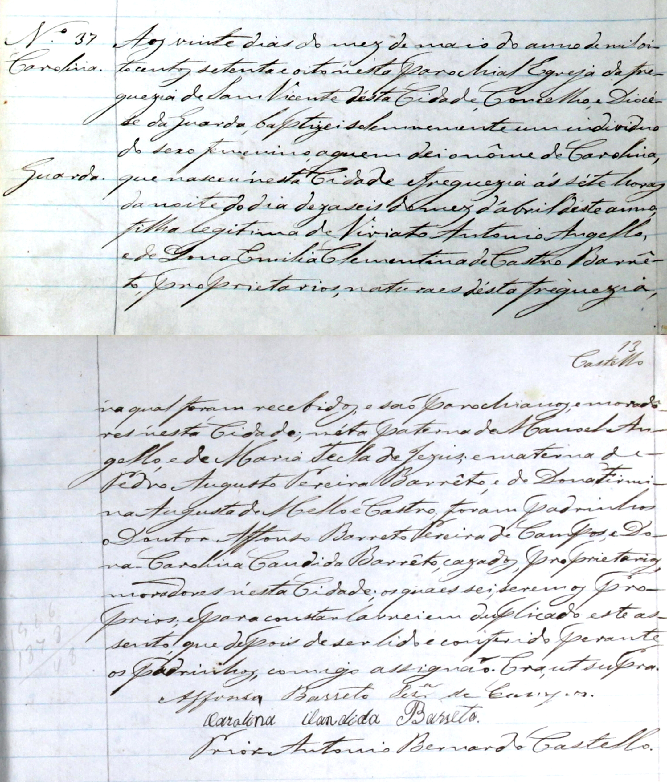 Registo de baptismo de Carolina Beatriz Ângelo. Obtido a partir do da digitalização em PDF no site do Arquivo Distrital da Guarda, O Distrito da Guarda na I República